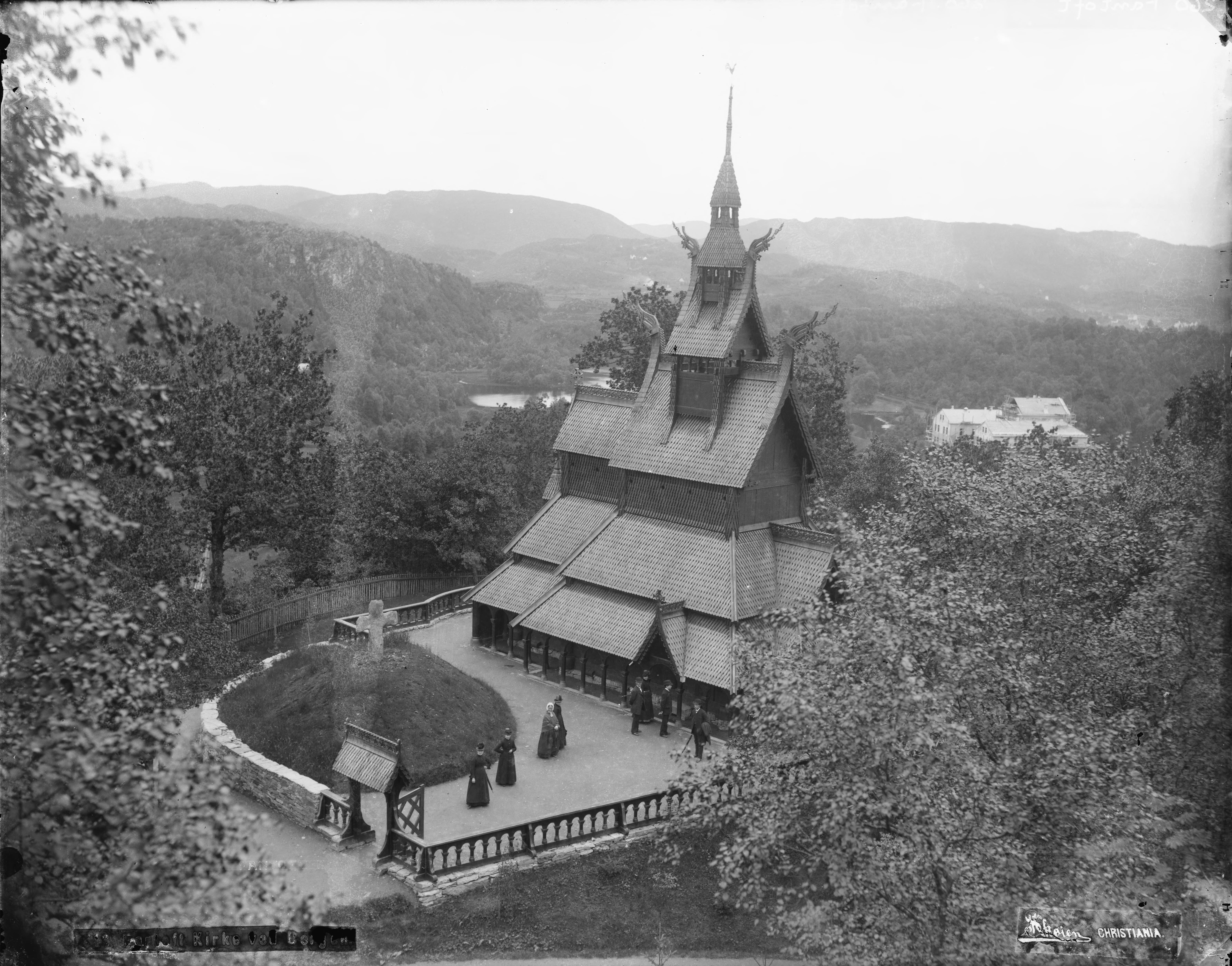 Skøiens katalog: Fantoft Stavkirke ved Bergen. Påskrift negativ: 643. Fantoft Kirke ved Bergen. Skøien Christiania. Påskrift negativ: 260 Fantoft [Riksantikvaren] Påskrift konvolutt: A-260 Fana. Fantoft stavkirke [Riksantikvaren] Sted: Fana Kommune: Bergen Fylke: Hordaland Tagger: Fantoft stavkirke eksteriør fasade gjerde port menn kvinner landskap kirkegjenger